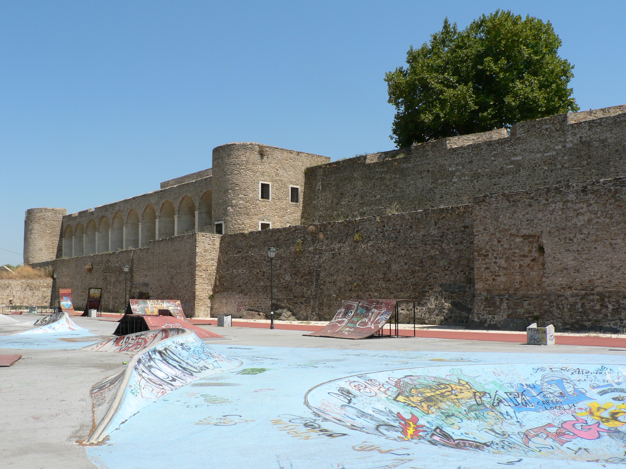 Le Château d'Abrantes, Portugal